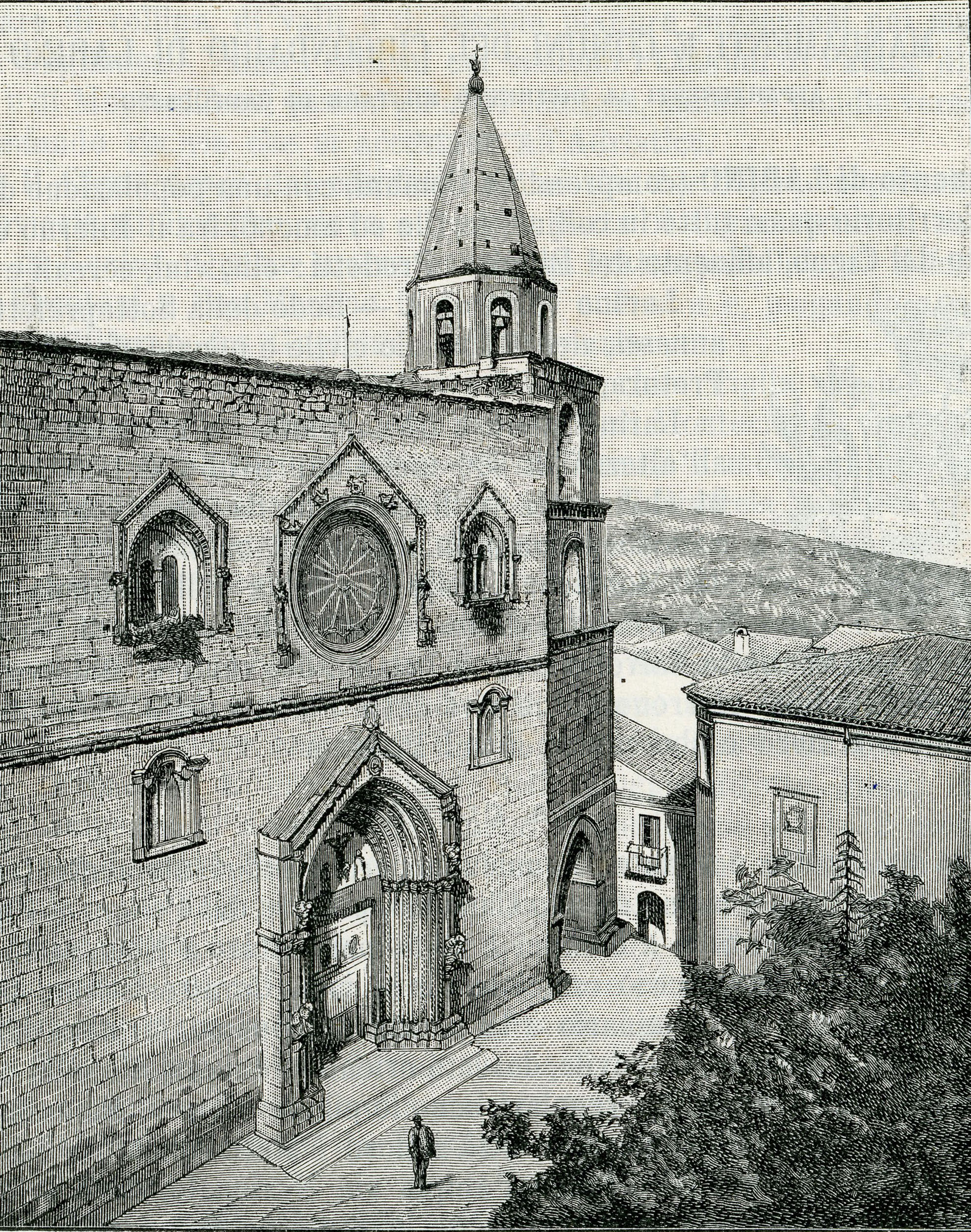 Larino: facciata della cattedrale (incisore anonimo 1898).